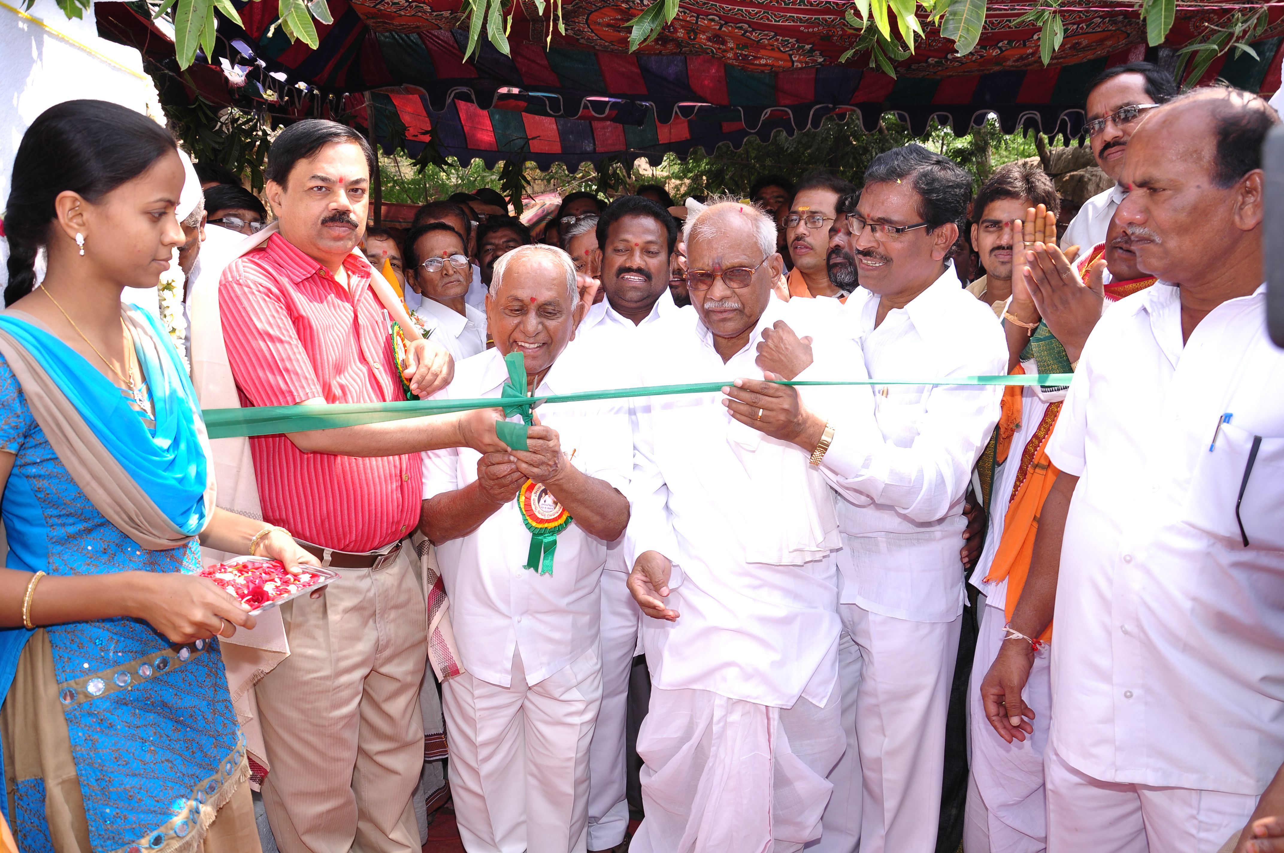 గ్రంధాలయ ప్రారంభోత్సవం